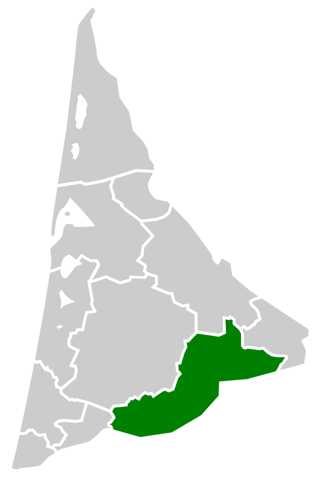 Localisation des Petites Landes